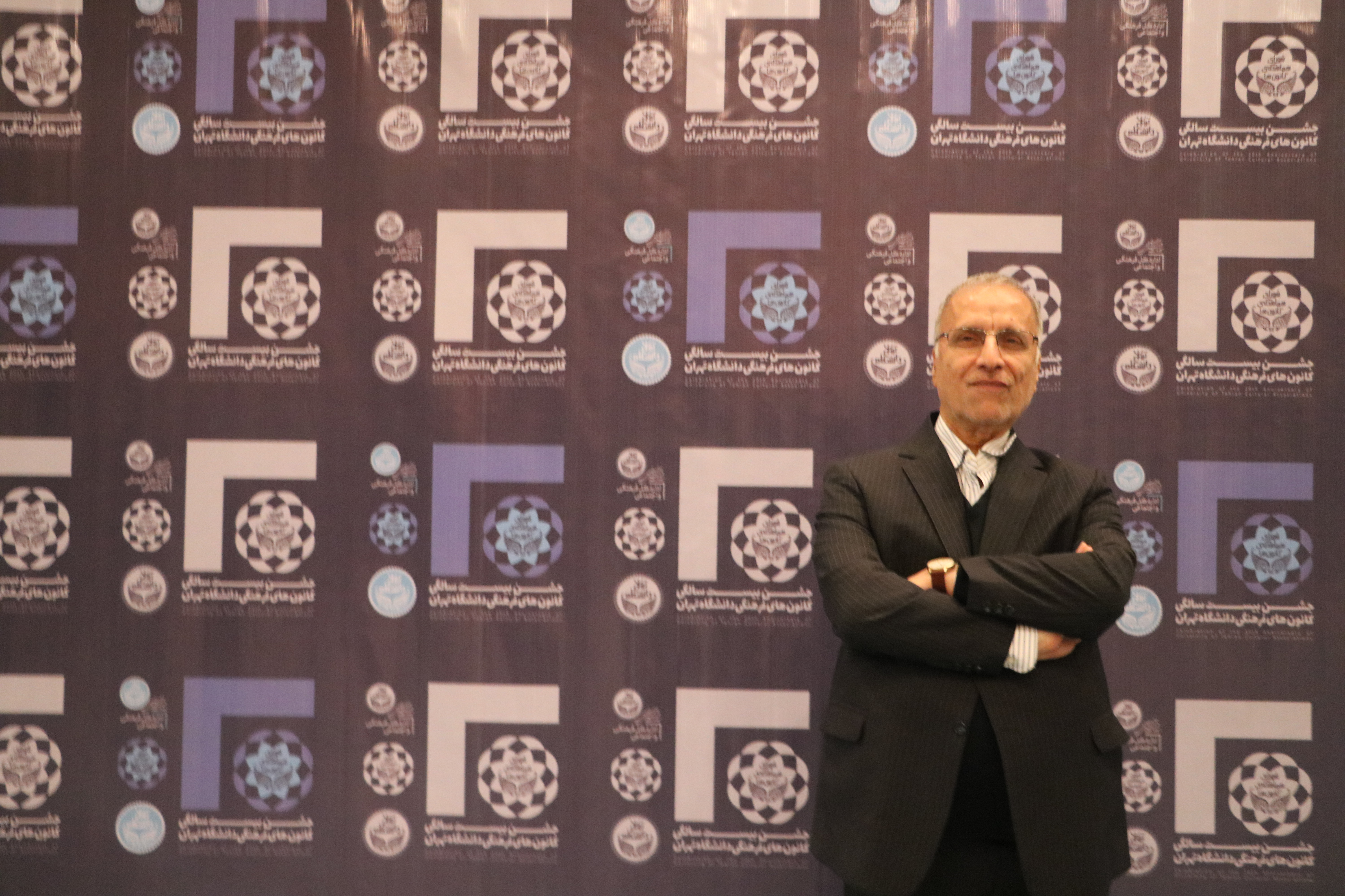 هادی خانیکی در جشن بیست سالگی کانون های فرهنگی، هنری، اجتماعی و دینی دانشگاه تهران